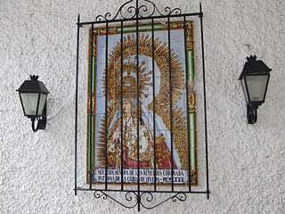 Mosaico de la Virgen de los Remedios en la Plaza del Ayuntamiento.